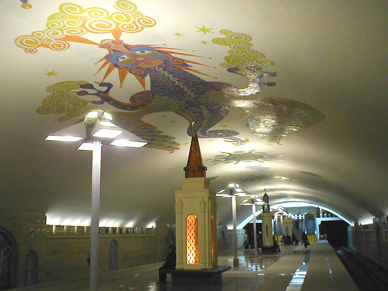 Станция "Кремлёвская" метро Казани Kazan Metro Kremlyovskaya Station